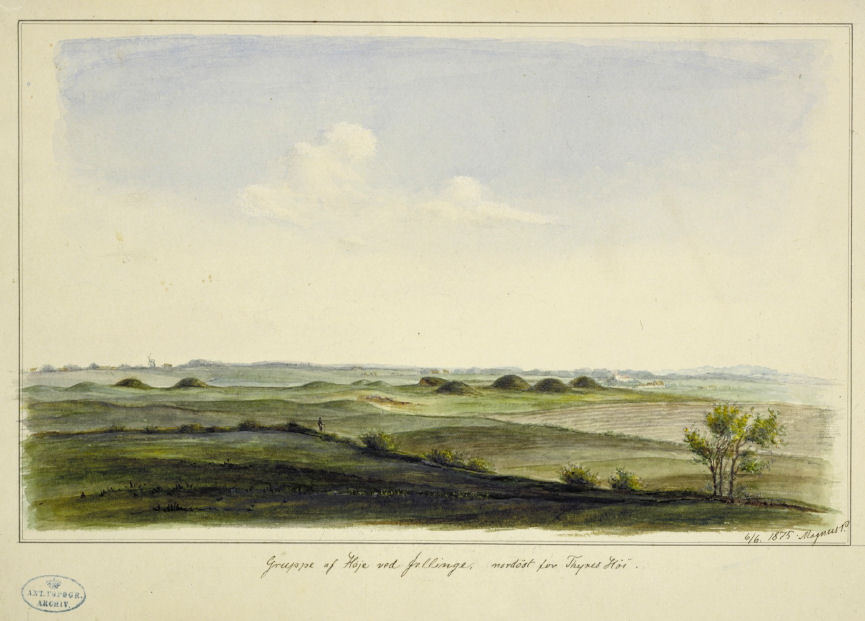 Akvarel af Magnus Petersen, 6. juni 1875. Gruppe af høje (Mangehøje), NØ for Nordhøjen i Jelling, Jelling sogn.